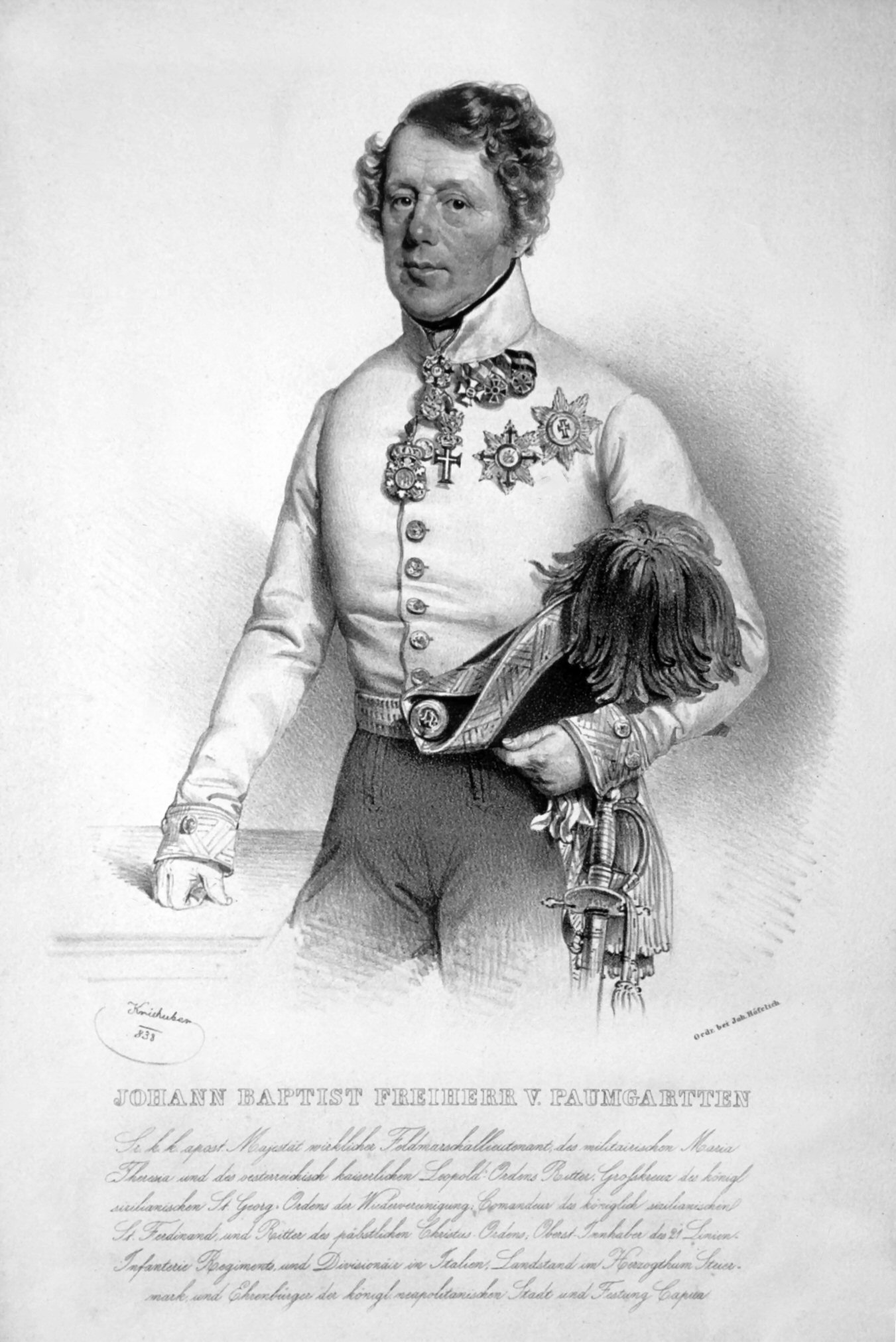 Johann Baptist Freiherr von Paumgartten (1772-1848), k. k. Feldmarschalleutnant, Ritter des Maria-Theresien-Ordens